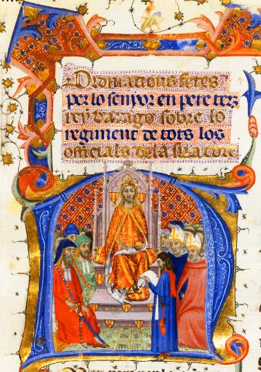 Ordinacions fetes per lo senyor en pere terz rey d'aragó sobre lo regiment de tots los officials de la sua cort Bibliothèque nationale de France BNF, ms. espagnol 99, f.1